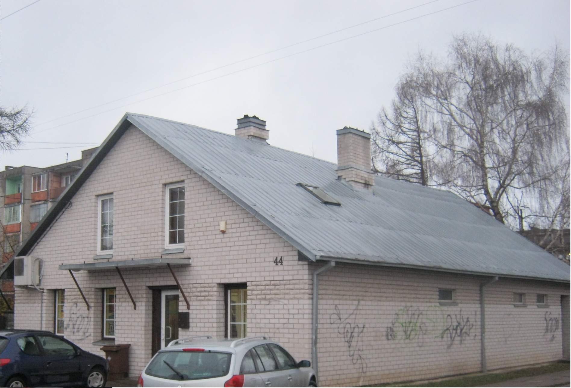 Buvusi žydų pradžios mokykla Klaipėdos g. 44